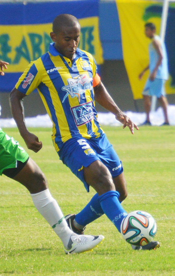 Jaime "Vampeta" Caicedo en Delfín Sporting Club de Manta-2014